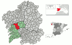 mapa de galicia